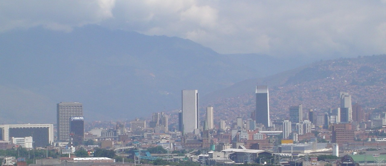 El centro de Medellín visto desde Guayabal. Foto tomada por jsv en Noviembre de 2004.